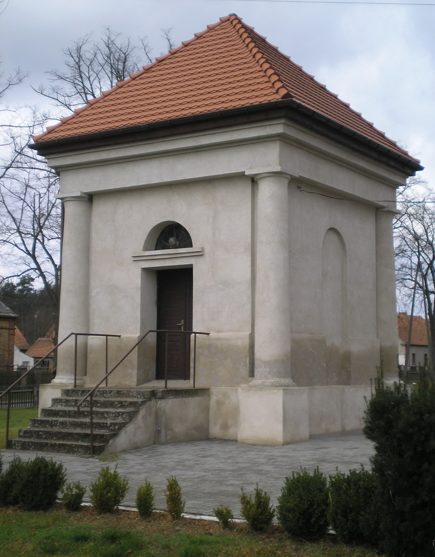 Grobowiec rodziny Manteuffel